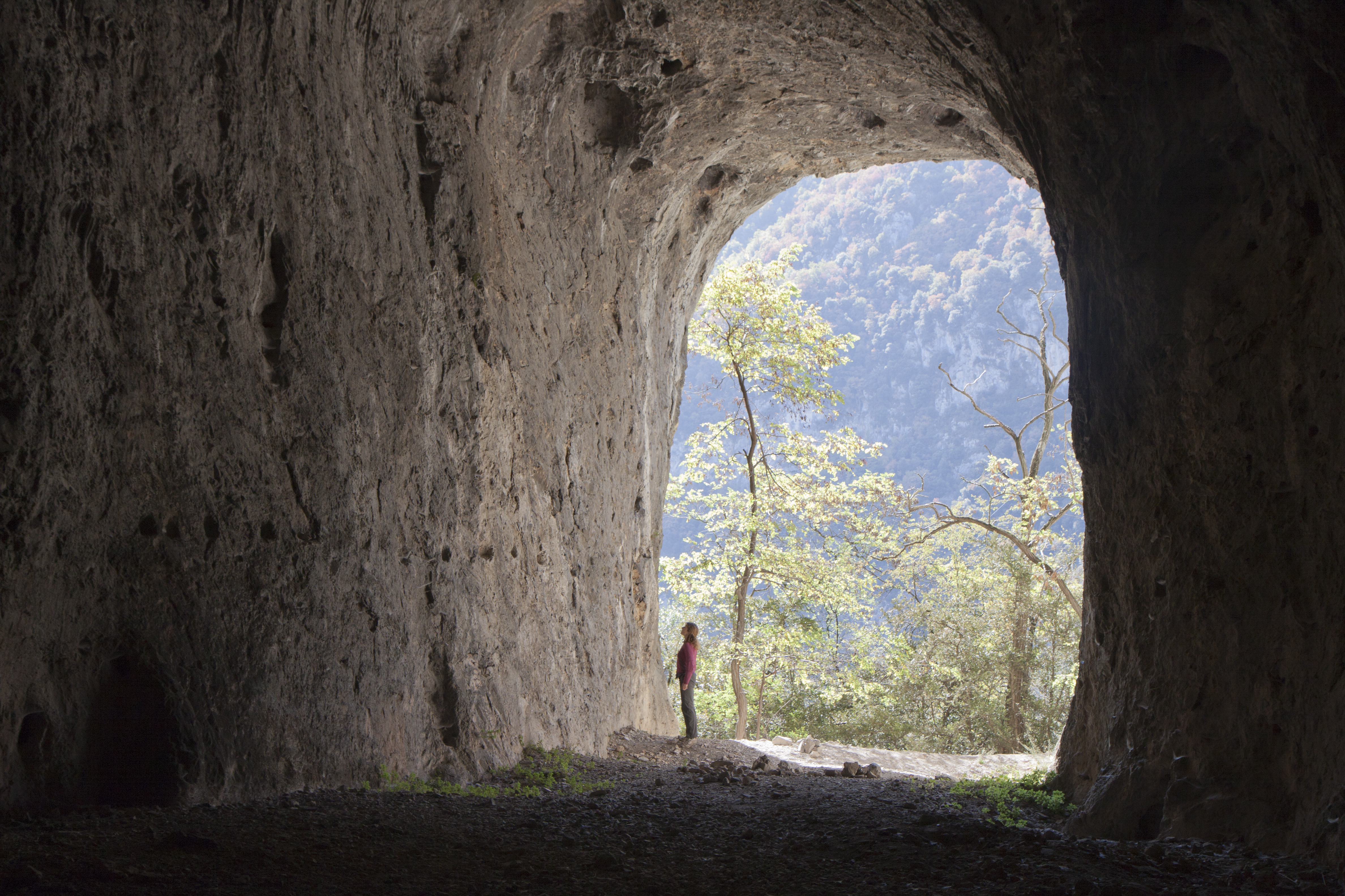 Grotte des Eglises